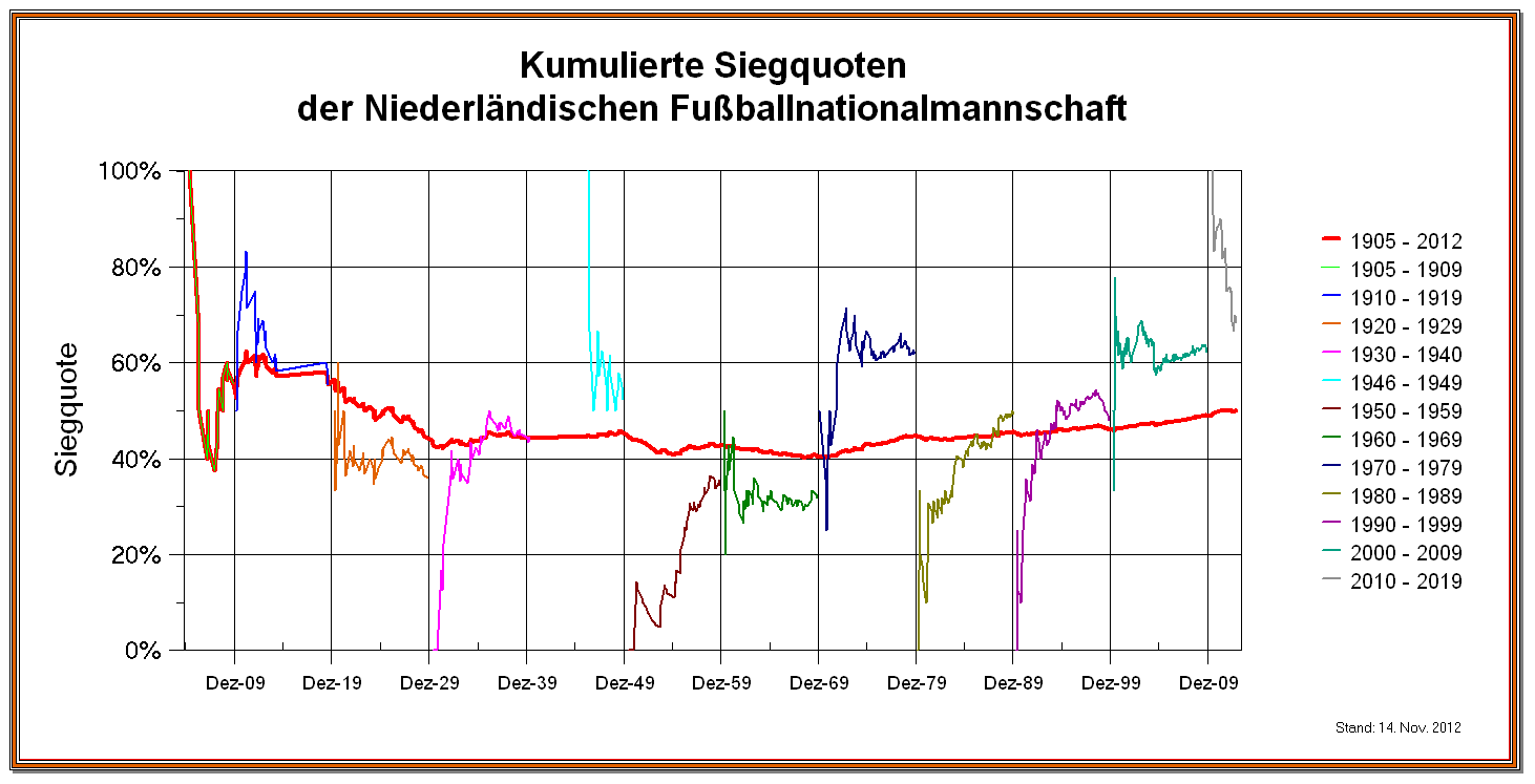 Kumulierte Siegquote der Niederländischen Nationalmannschaft